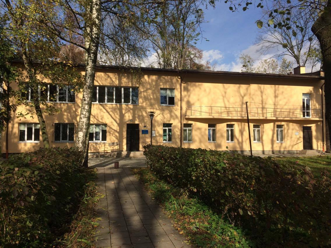 Знімка Школи Мистецтв імені Степана Турчака в Дублянах